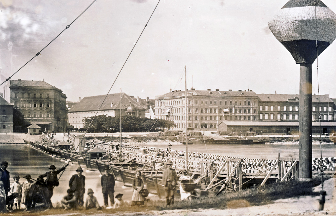 Pontónový most v Bratislave, 1825–1891